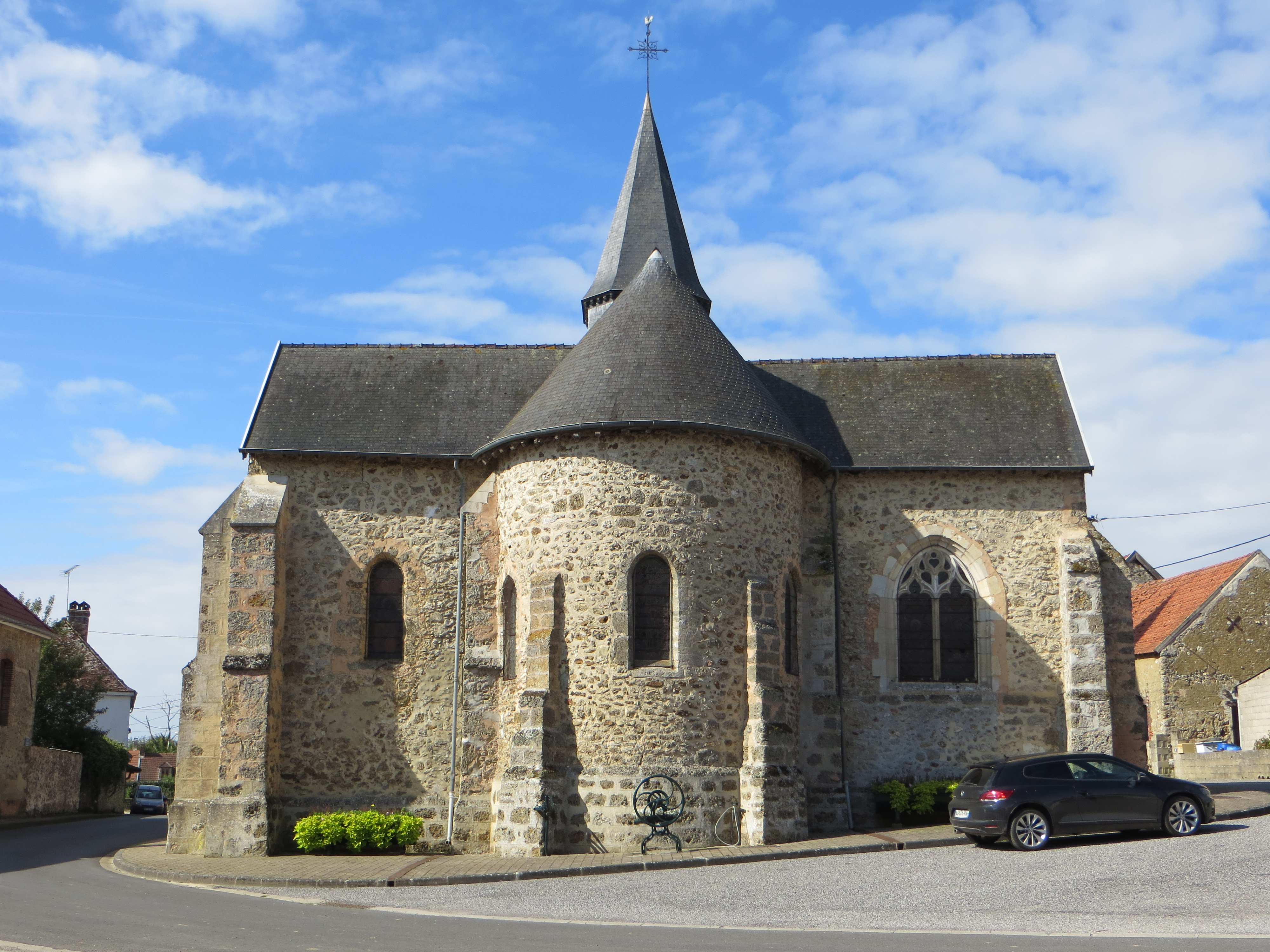 Vue générale de l'église